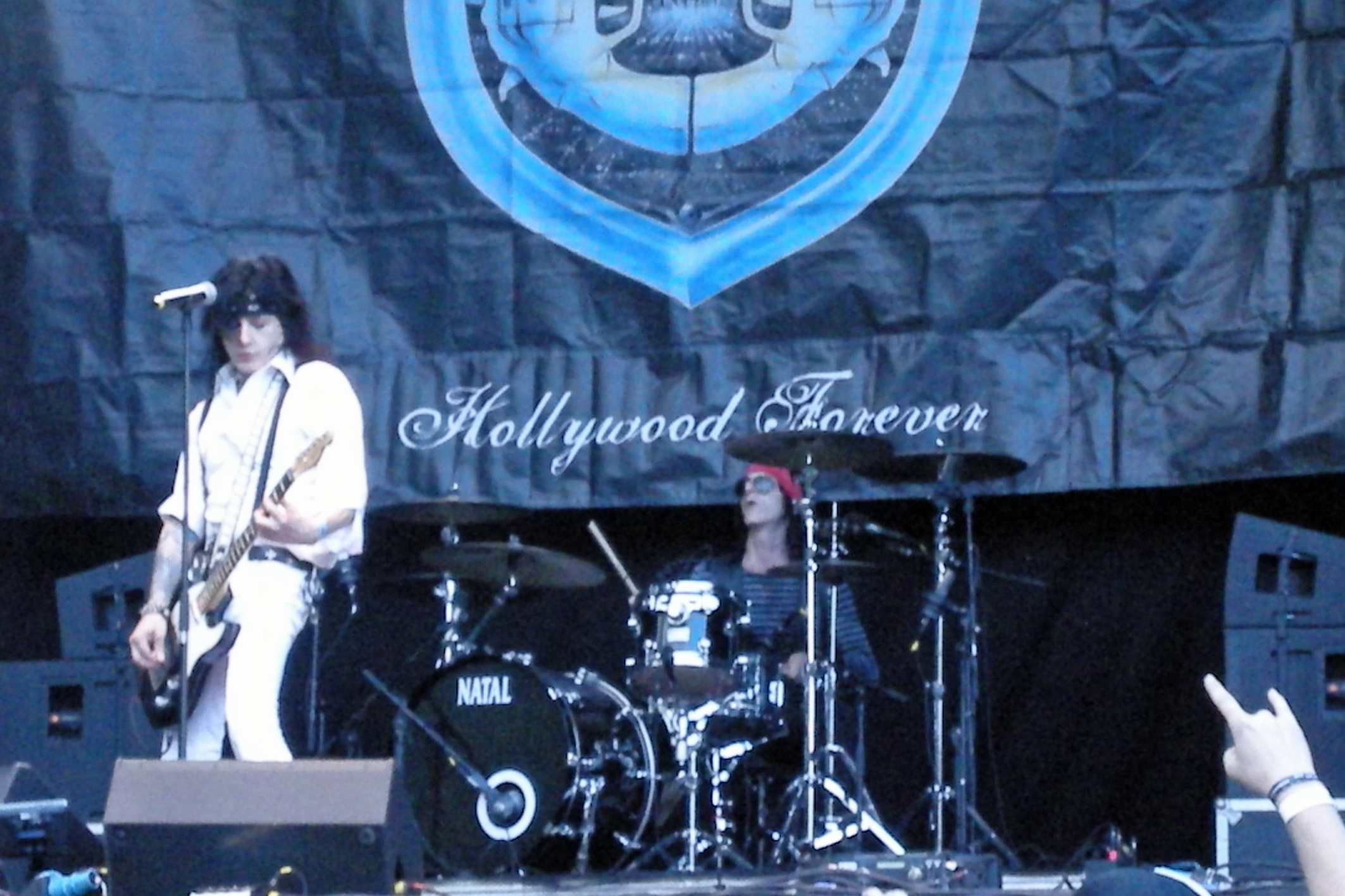 American rock band L.A. Guns at Skogsröjet 2012